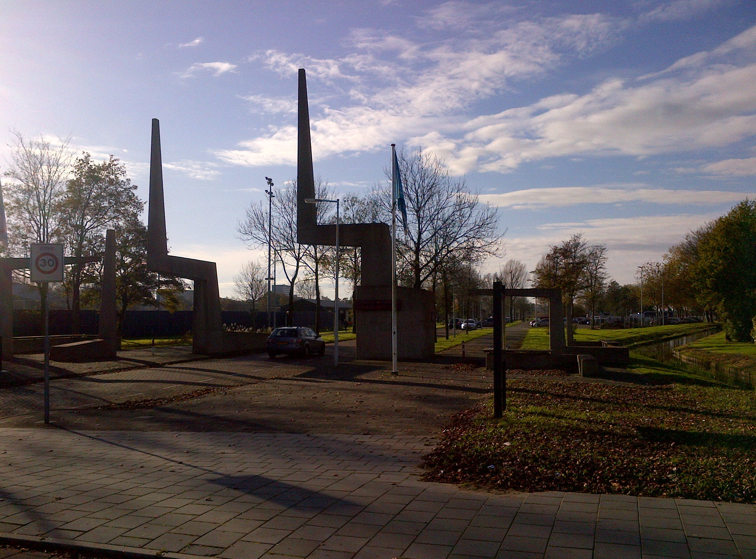 Plastisch teken, ofwel De Poort van Constant (Nieuwenhuis), bij de ingang van Sportpark Ookmeer aan de Troelstralaan; 9 november 2014